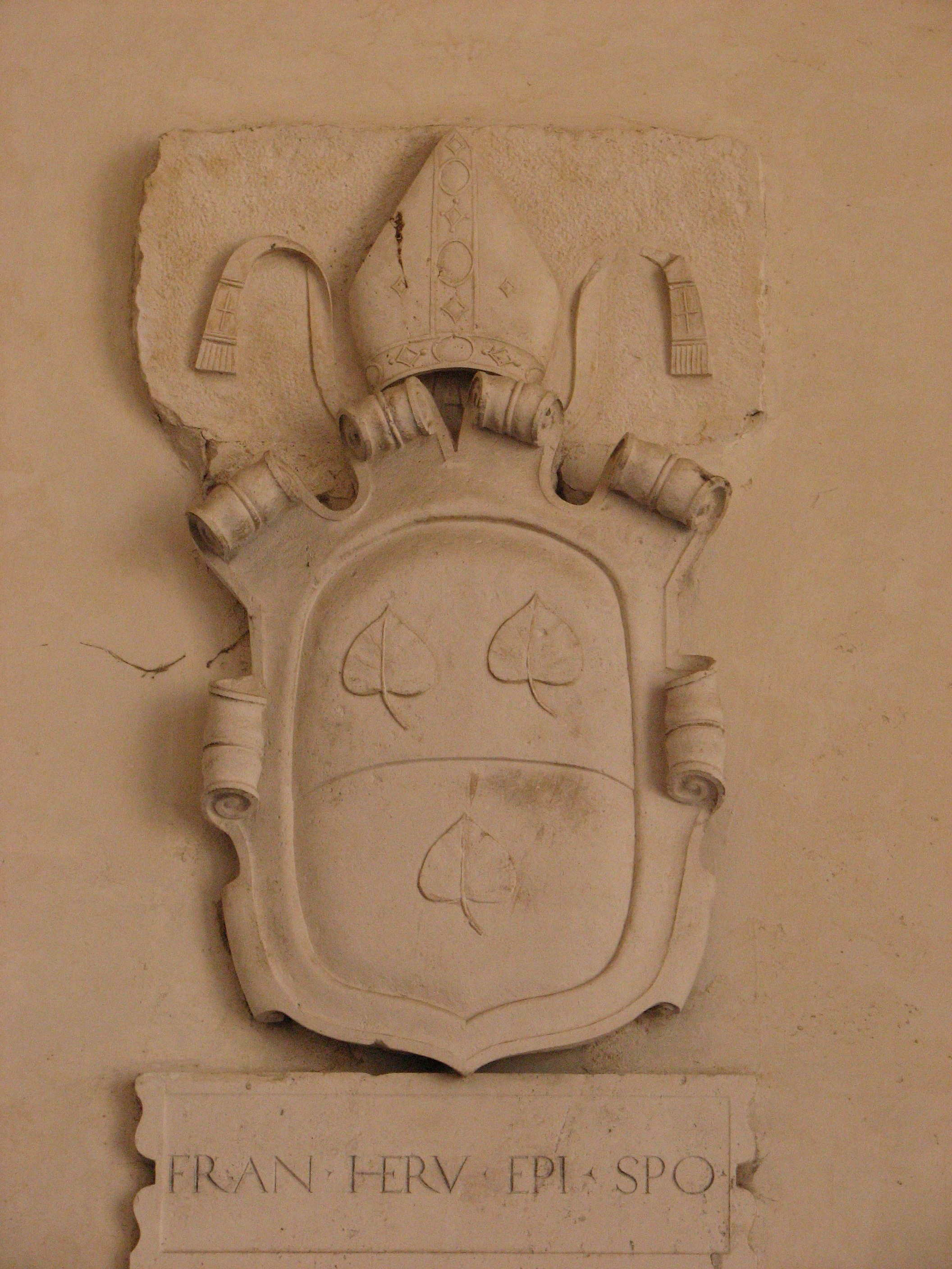 stemma vescovo francesco eroli duomo spoleto